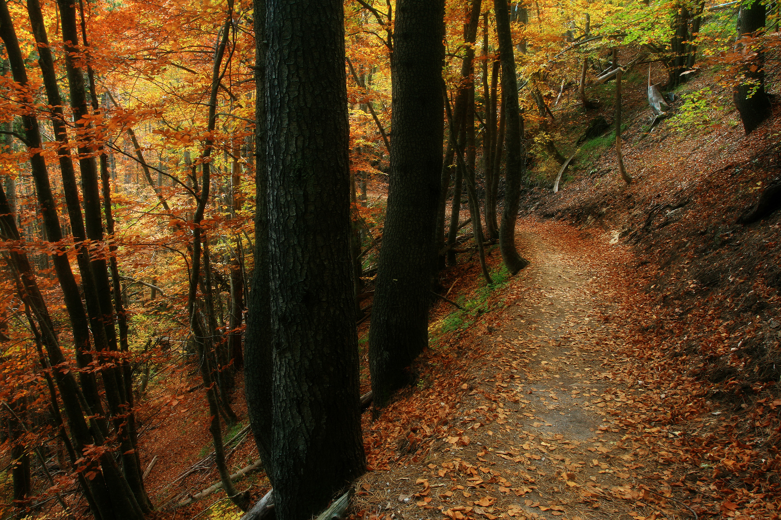 Το μονοπάτι από τα Πριόνια προς το καταφύγιο Σπήλιος Αγαπητός This is a photography of Natura 2000 protected area with ID GR1250001